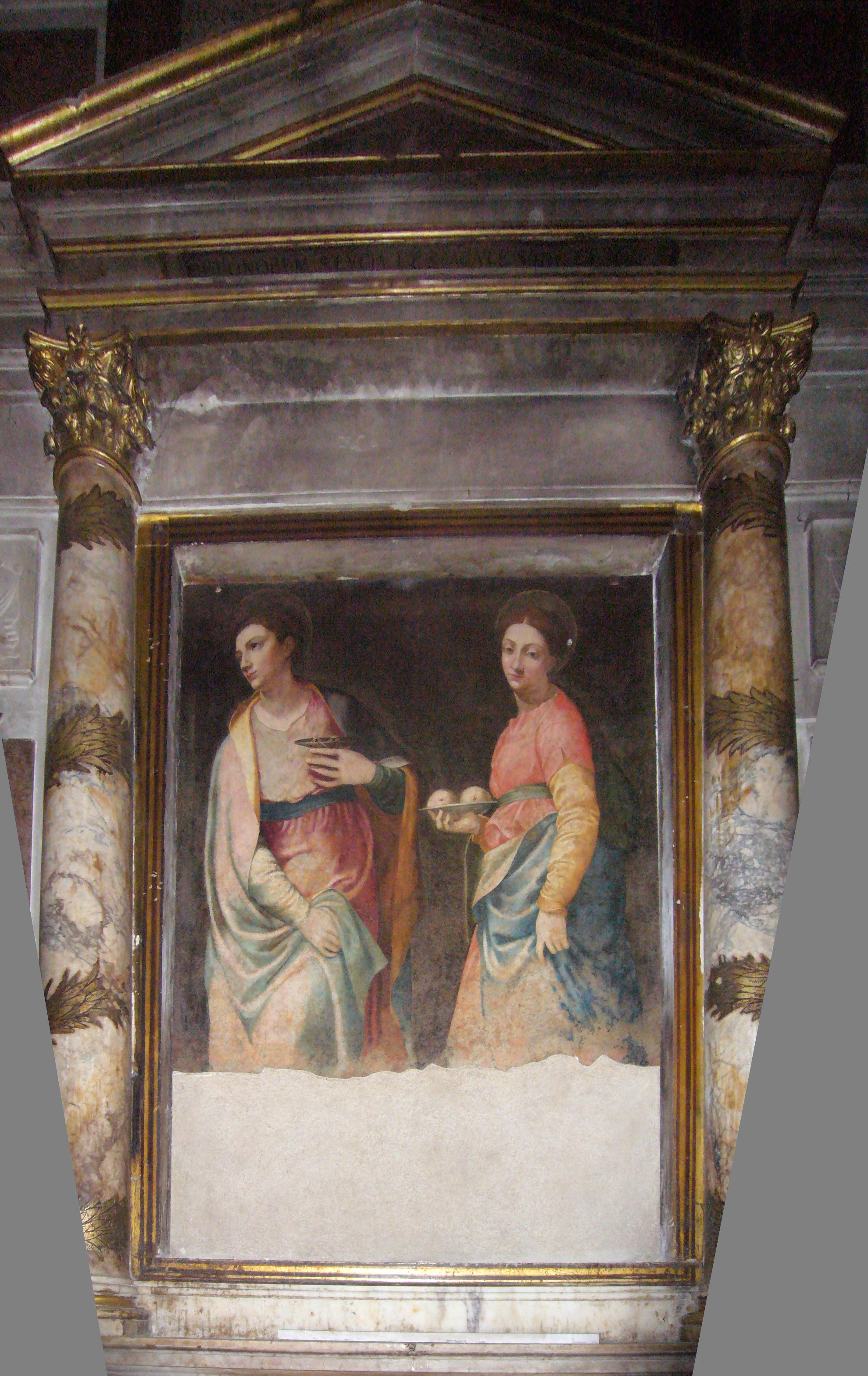 Girolamo Siciolante da Sermoneta: santa Lucia e sant'Agata - affresco a Santa Maria sopra Minerva in Roma